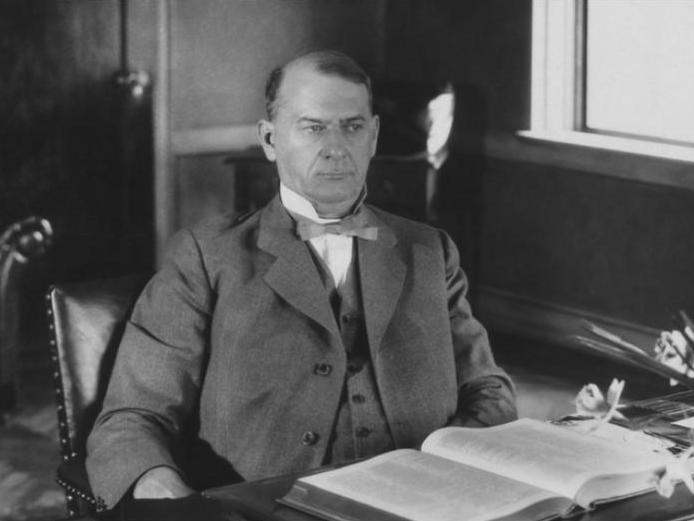 Joseph Franklin Rutherford (1869-1942)